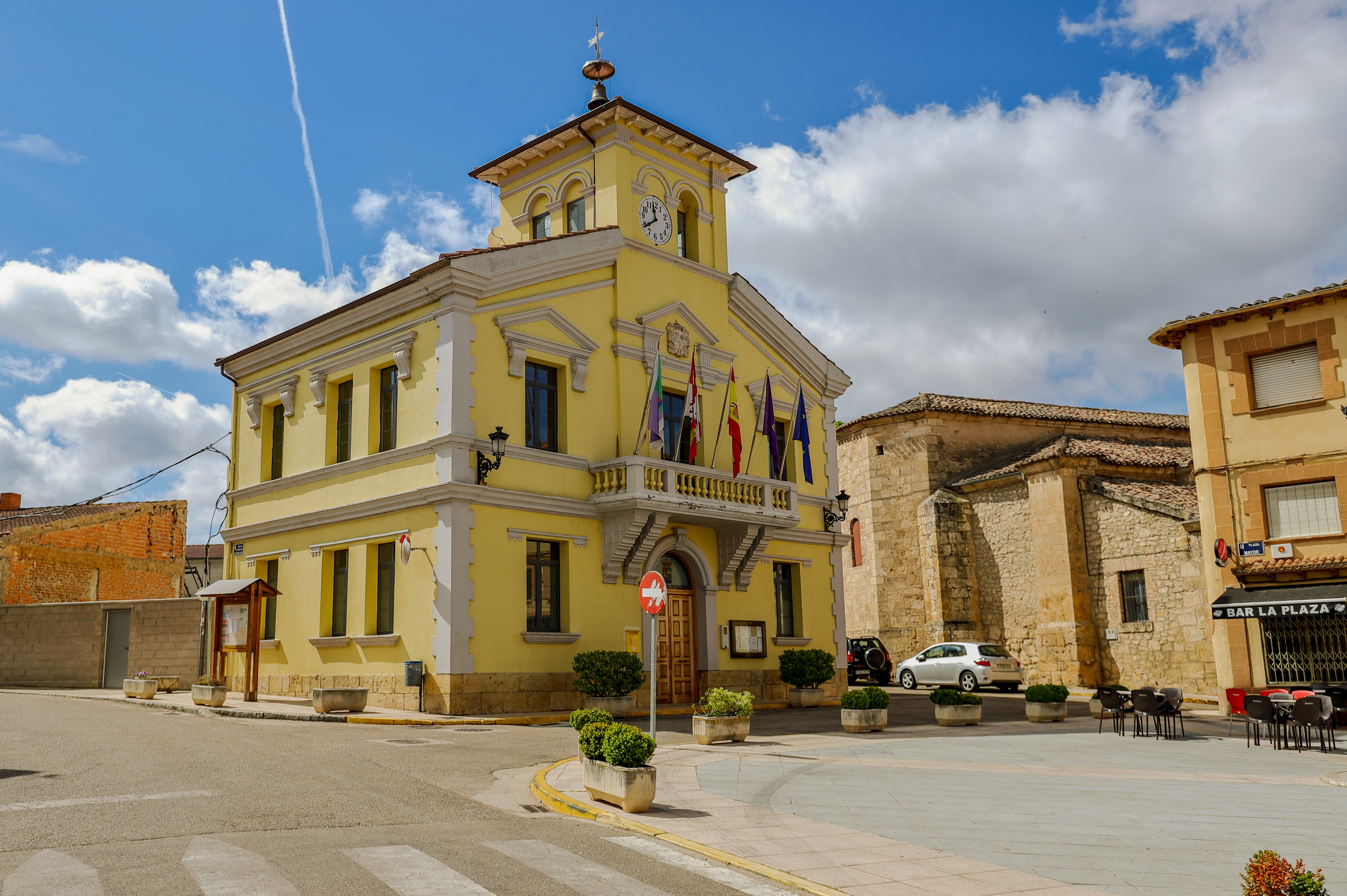 Villanueva de Gumiel es un municipio de la comarca Ribera del Duero, provincia de Burgos.